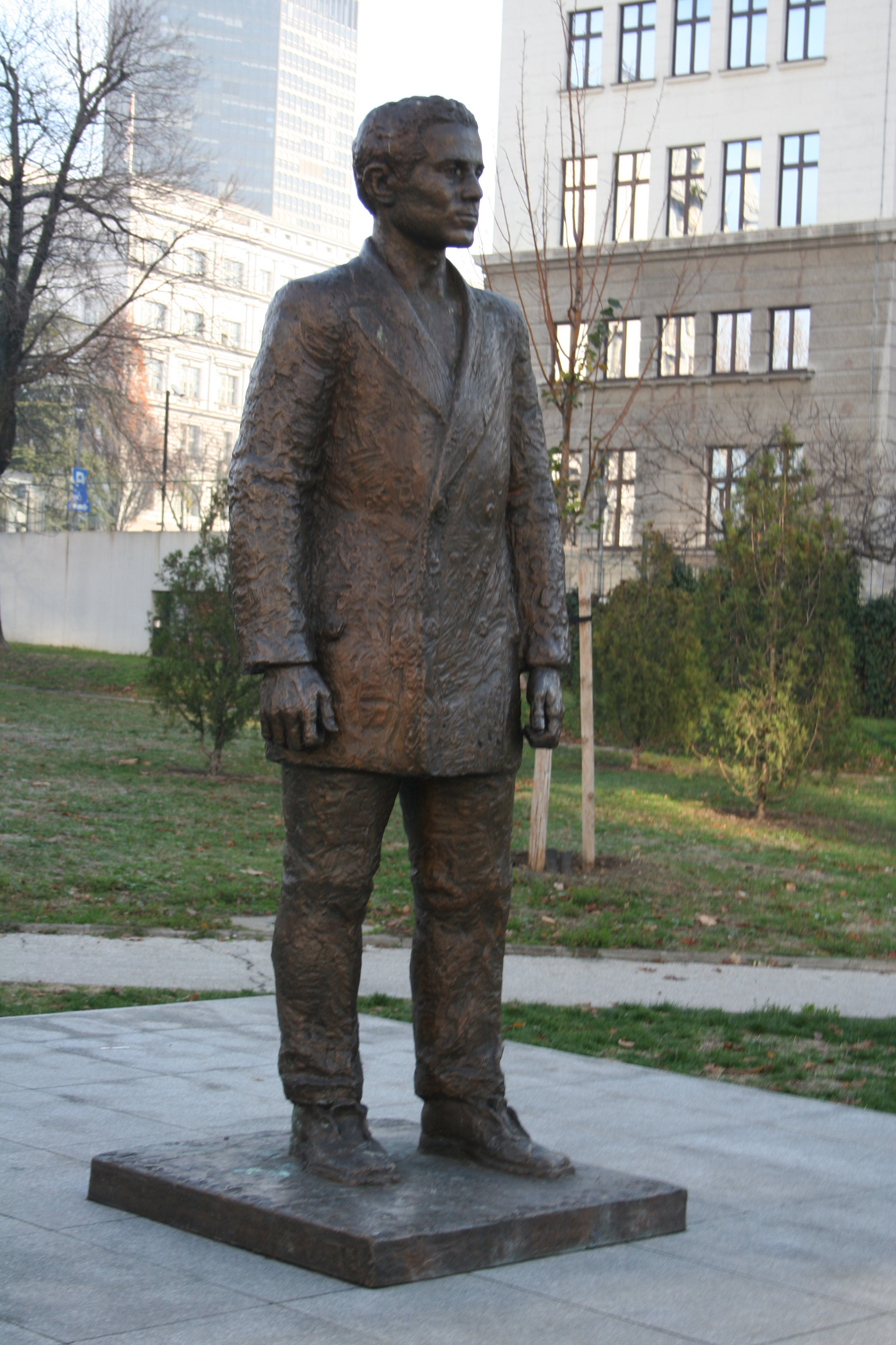 Spomenik Gavrilu Principu u Beogradu